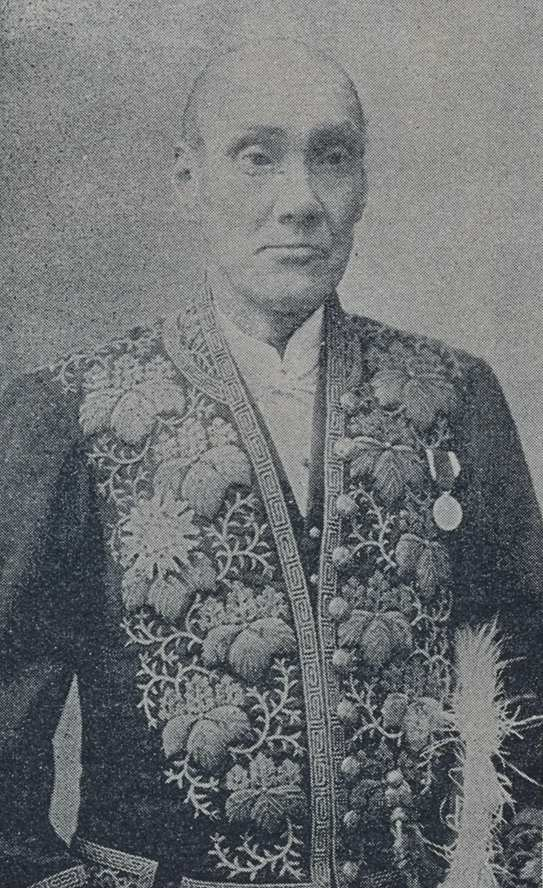 広幡忠礼の肖像写真。